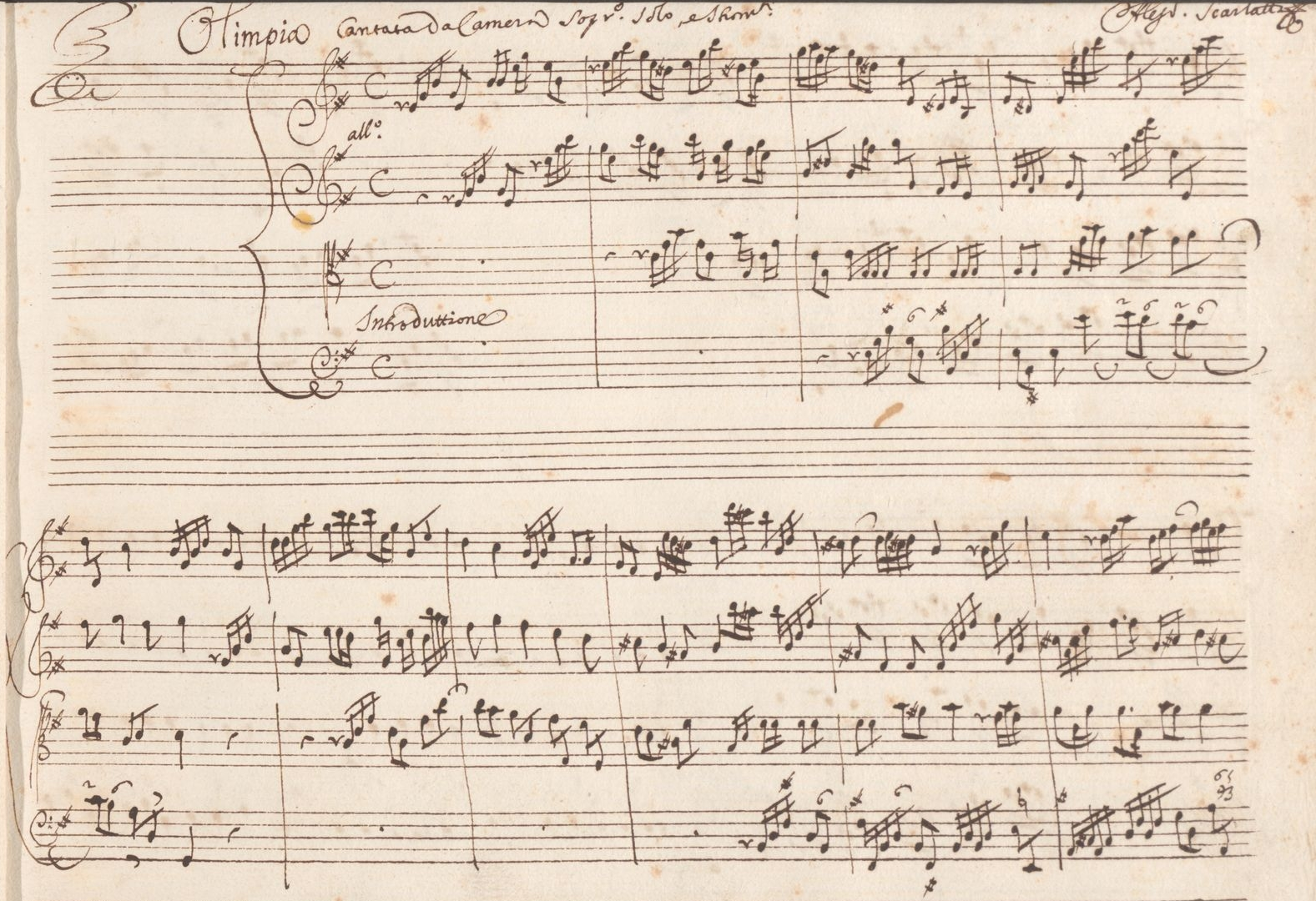 Incipit de la Sinfonia de la cantate de chambre « L'Olimpia » (Su la sponda del mare) H.698 d'Alessandro Scarlatti (Ms. Vienne SA.67.G.100).